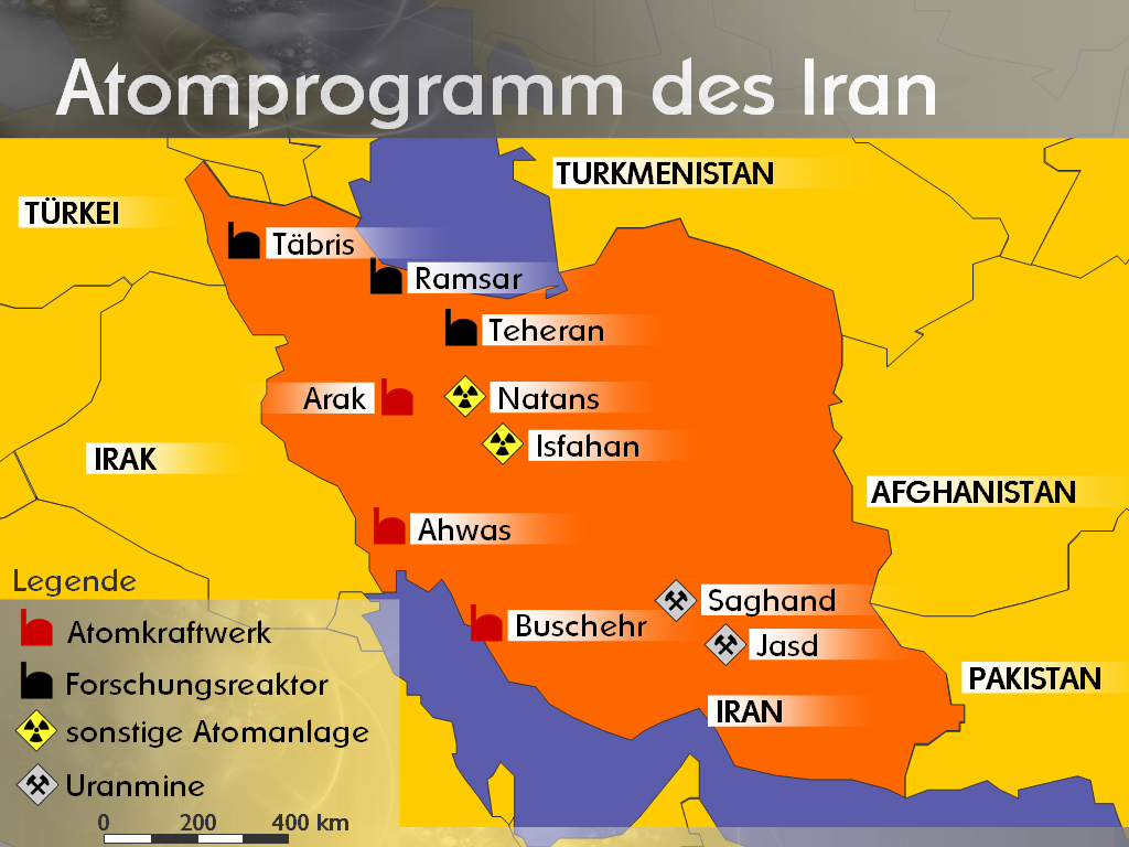 Atomprogramm des Iran Zweite Version